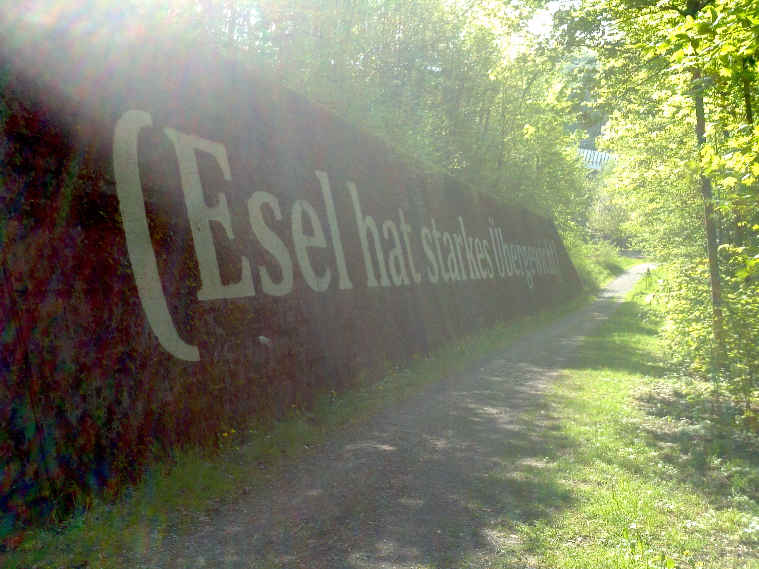 (Esel hat starkes Übergewicht), Daniel Robert Hunzikers Kunstprojekt am Limmatufer.